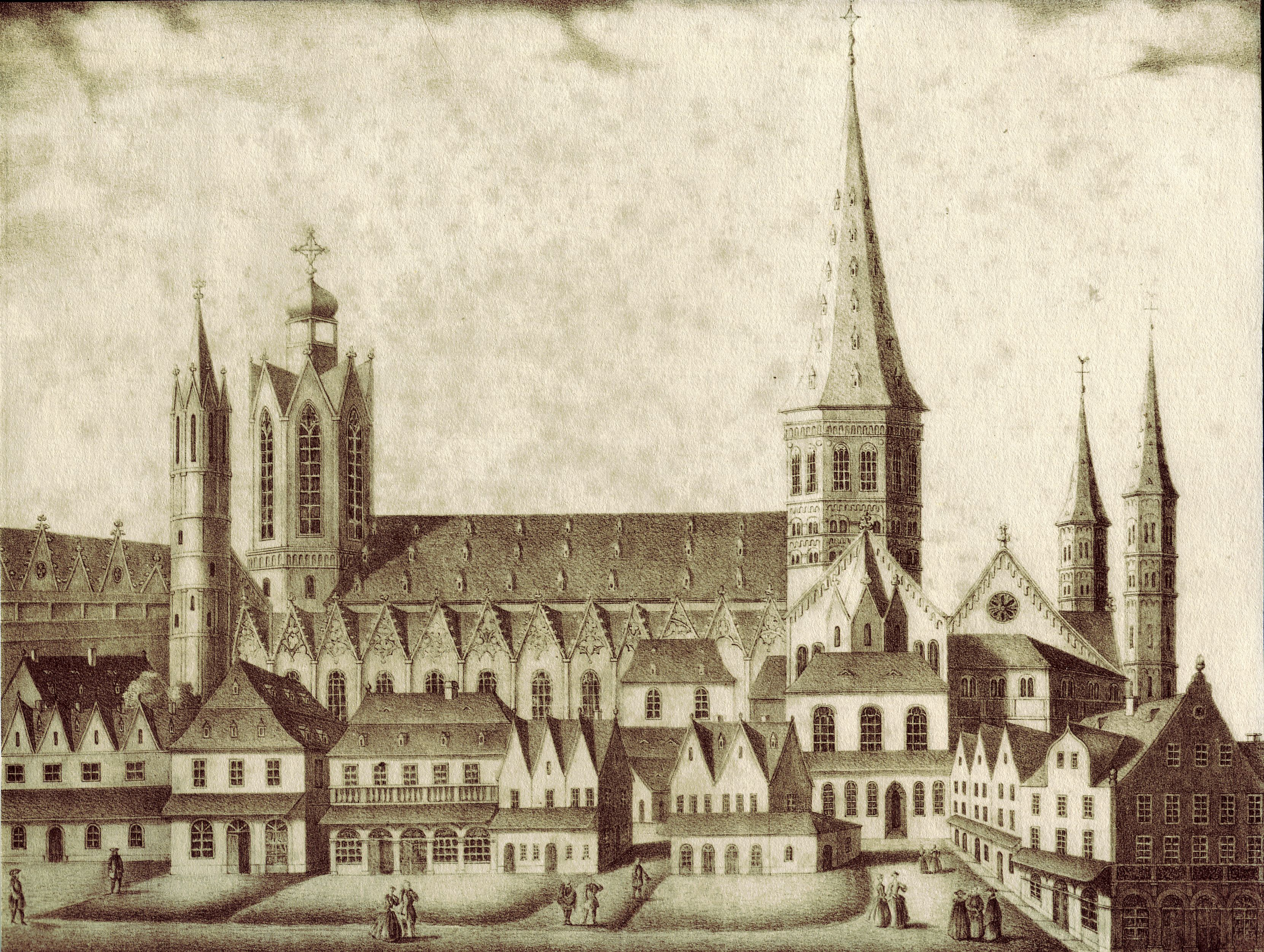 [Originalbeschreibung] Den 22. Mai 1767 zündetet der Blitz den hohen zugespitzten Haupthurm des Domes und legte denselben nebst der ganzen Kirche und den umliegenden Gebäuden in Asche. Nur durch große Anstrengungen wurde das Langhaus, der Pfarrthurm, das Dach und der kleine Thurm nach dem Kreuzgange zu so wie dieser selbst gerettet.